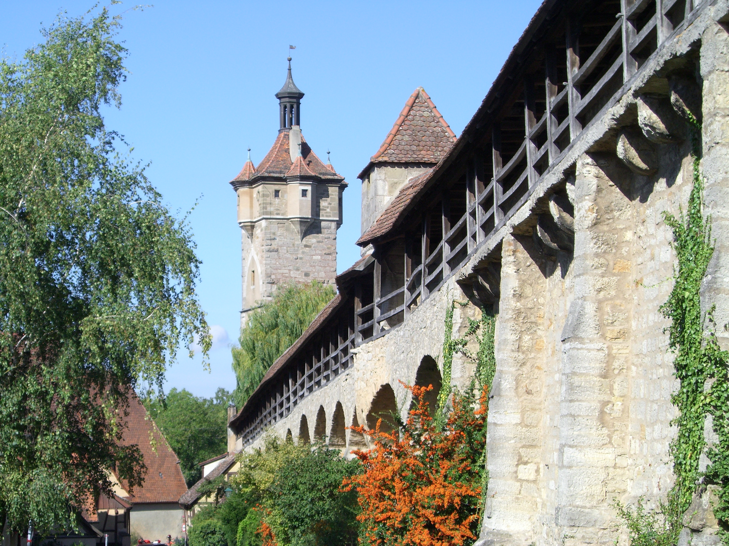 Rothenburg ob der Tauber, Stadtbefestigung mit Klingentorturm